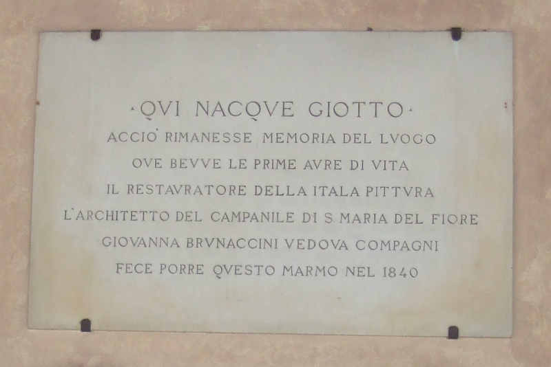 Plaque commémorative sur la maison natale de Giotto à Vespignano (frazione de Vicchio)